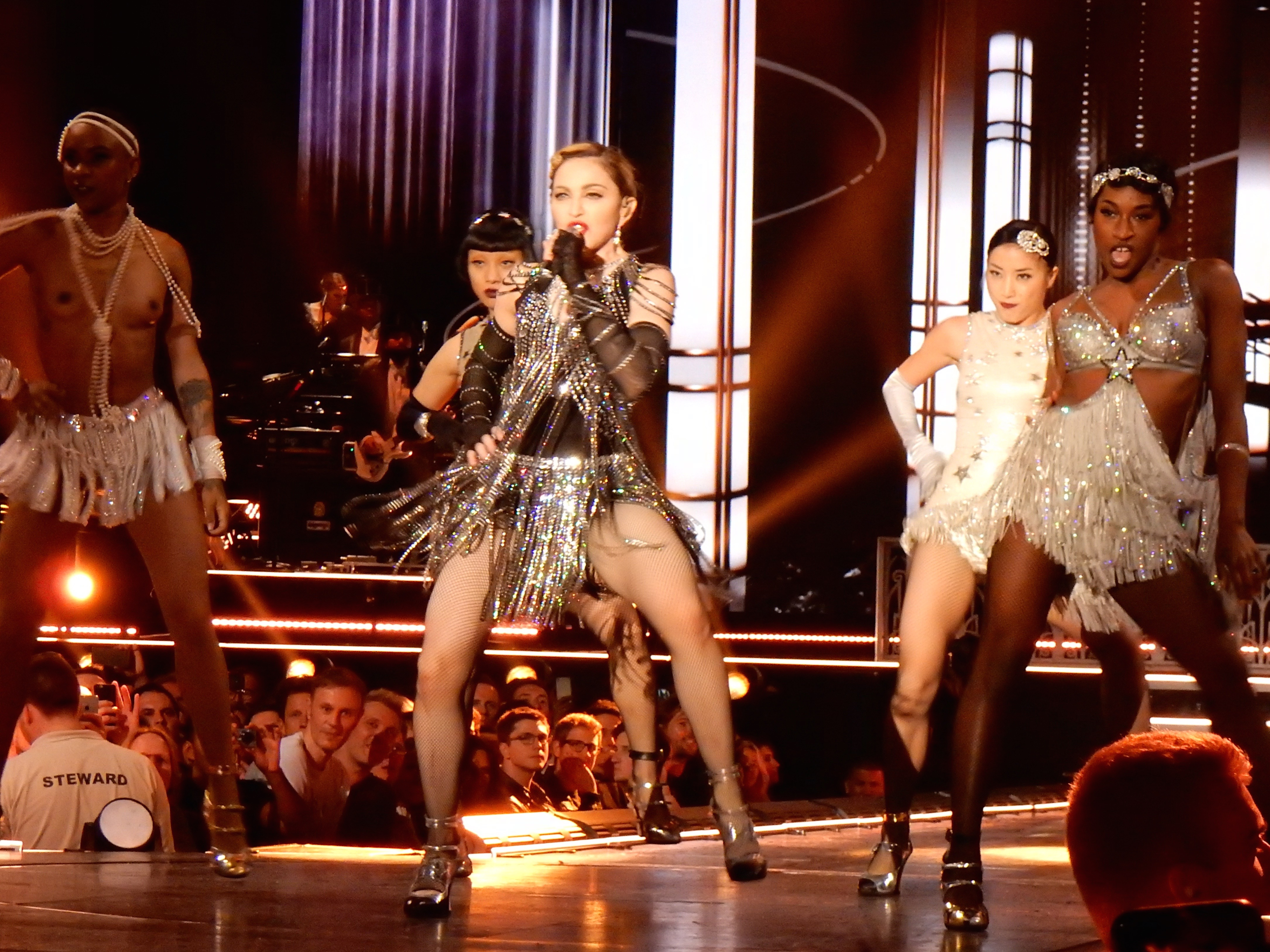 Madonna - Rebel Heart Tour Cologne 2